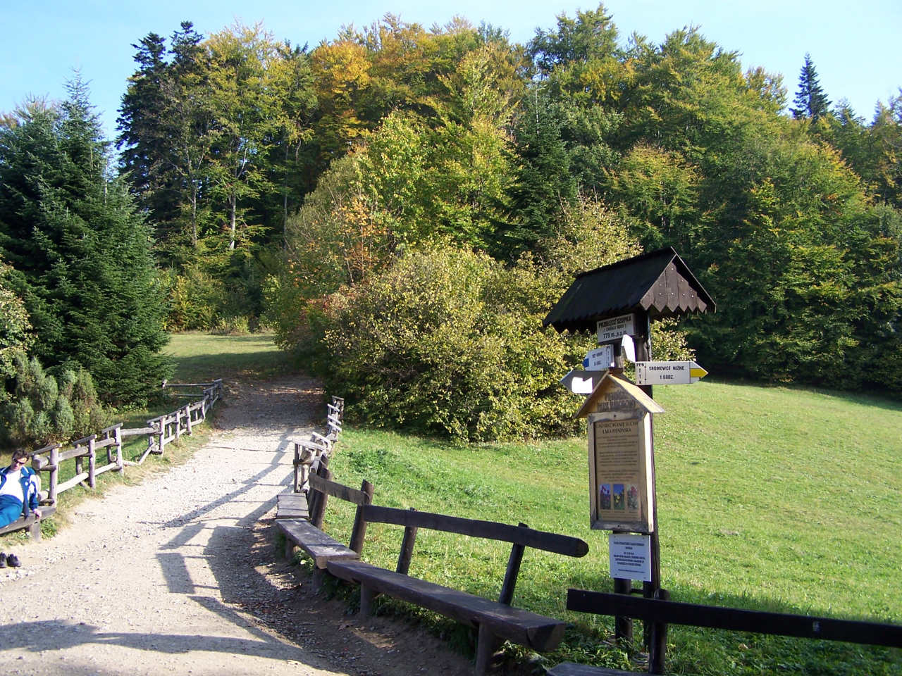 Przełęcz Szopka (Pieniny)